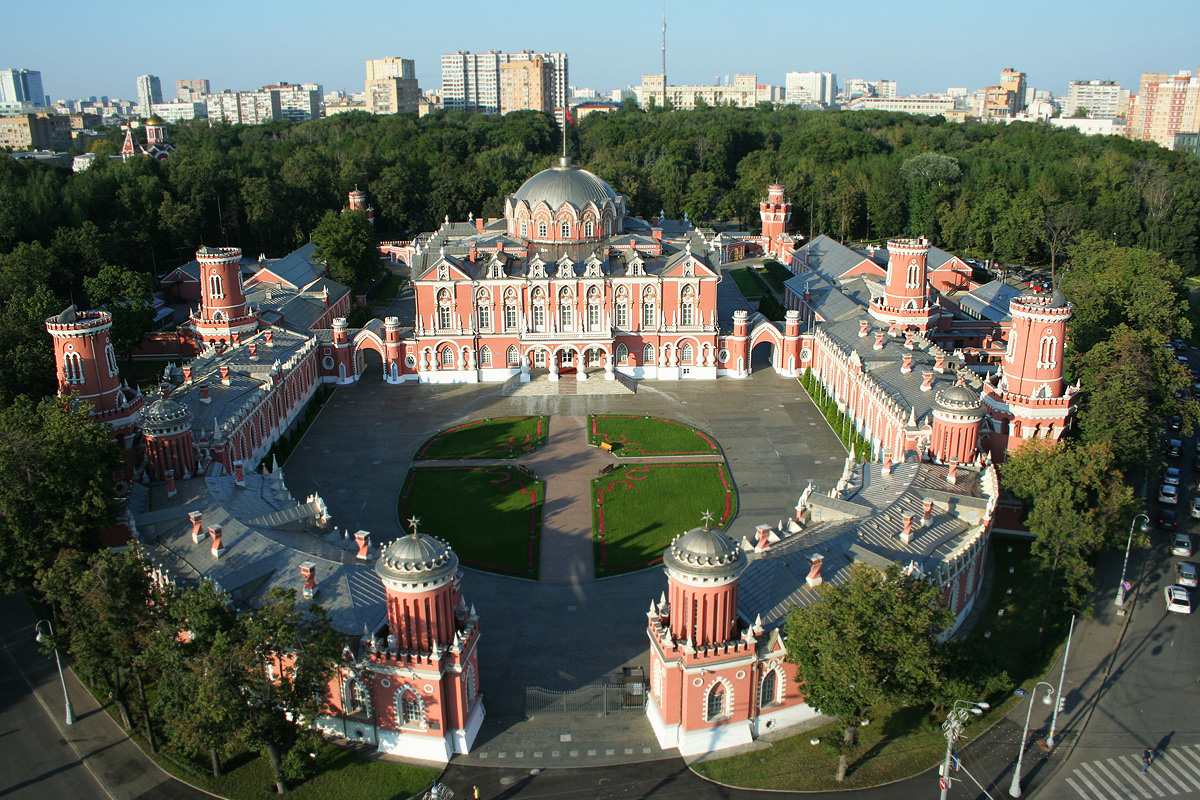 Петровский путевой дворец (Москва и Московская область, Москва, Ленинградский проспект, 40)